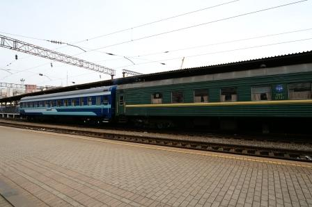 シベリア鉄道の客車 ハルビン東行き国際列車 Siberië spoorwegpassagiers auto Harbin eastbound trainen